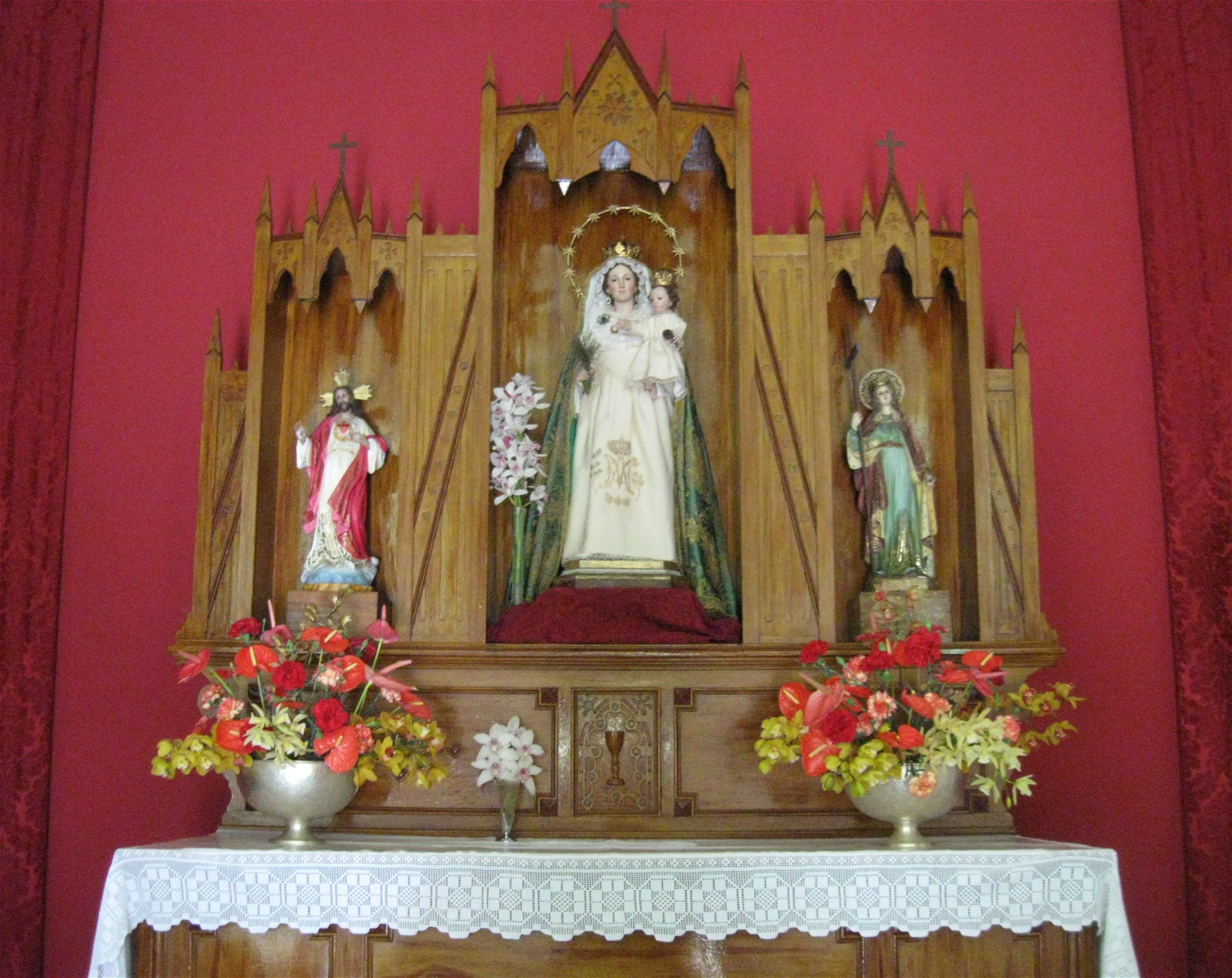 Altar, Ermita Pino de la Virgen, El Paso, La Palma